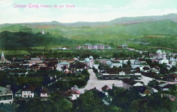 Vedere spre est pe direcţia pieţei. În centru: Hotelul Regal, în dreapta: Biserica Domnească. 1908 Ed. Gh. N. Vlădescu Nr. 571 (c. 1909) Idem cu Biserica Sf Ilie în dreapta imaginii.